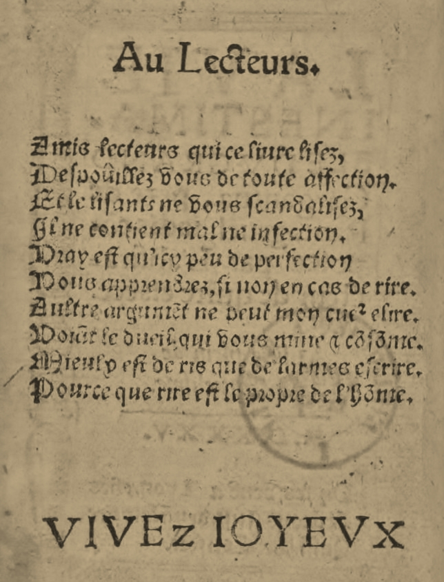 Envoi au lecteur du second roman de Rabelais, dans l'édition de François Juste de 1535.